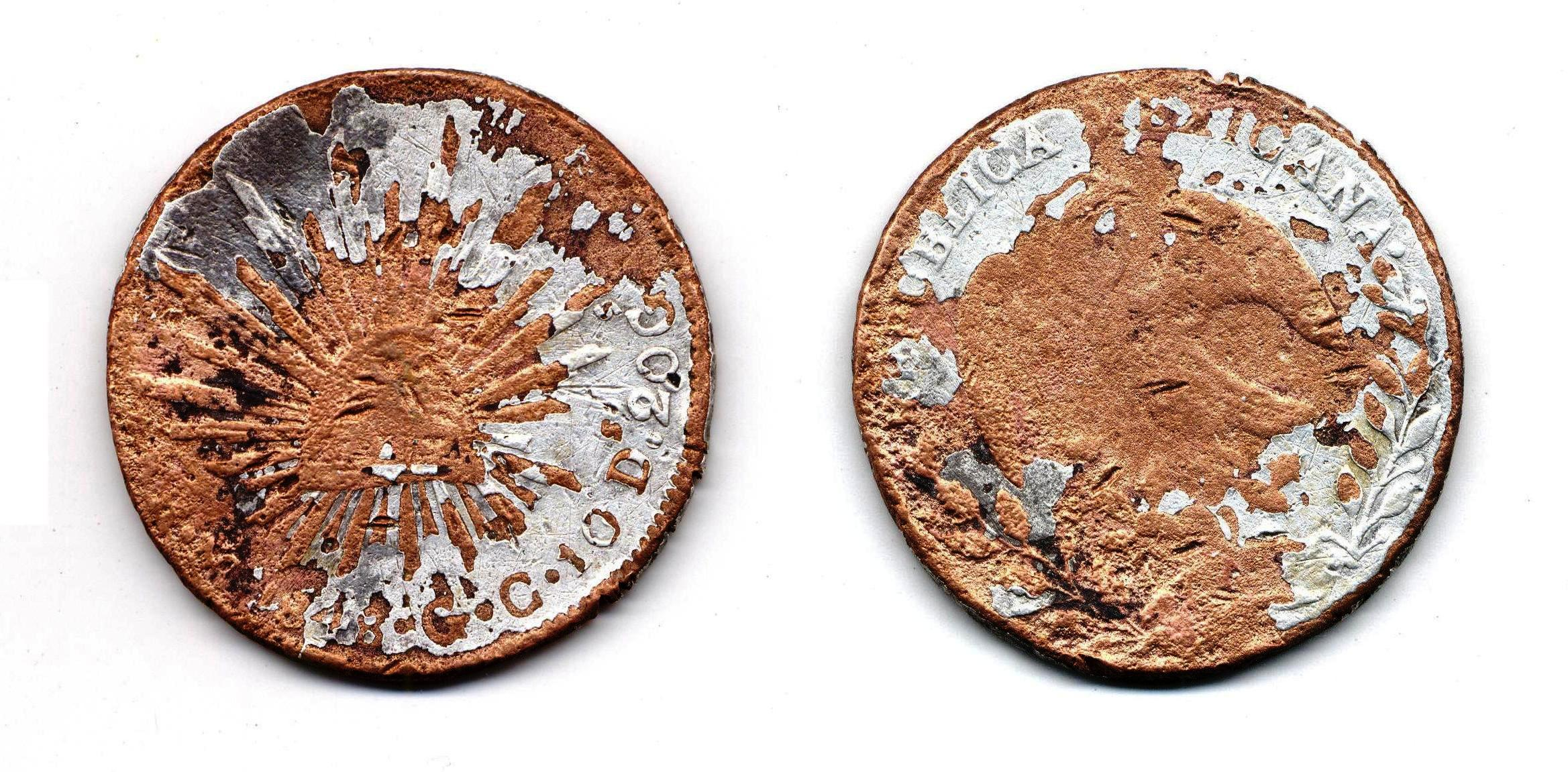 Moneda falsa de 8 reales supuestamente acuñada en México en 1848. La moneda fue troquelada en cobre y posteriormente recubierta de plata.